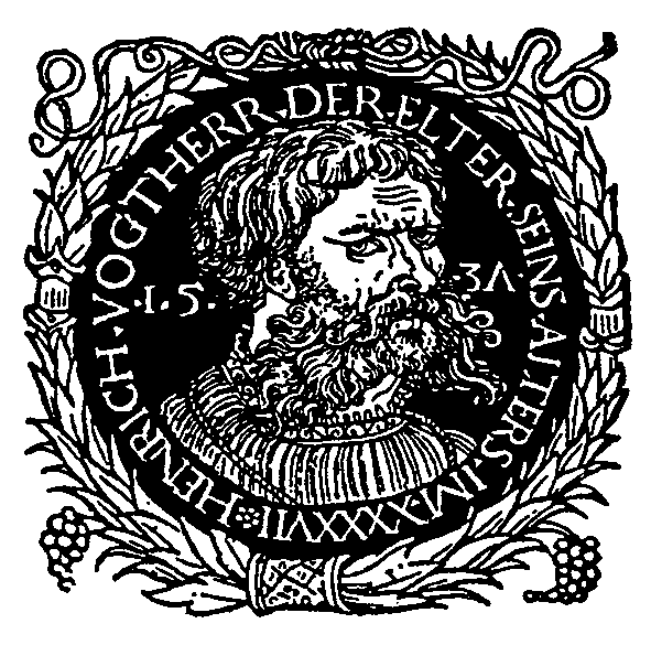 Heinrich Vogtherr der Ältere im Alter von 47 Jahren, Selbstporträt, Holzschnitt 1537. Titelabbildung in Medaillonsform (neben der seines Sohnes Heinrich Vogtherr des Jüngeren) aus Vogtherrs »Kunstbüchlein«, Straßburg 1538. (Erstdruck und zwei Folgeauflagen in Vogtherrs eigenem Offizin, weitere Neuauflagen bei diversen Straßburger Druckern, Kopien in Antwerpen)